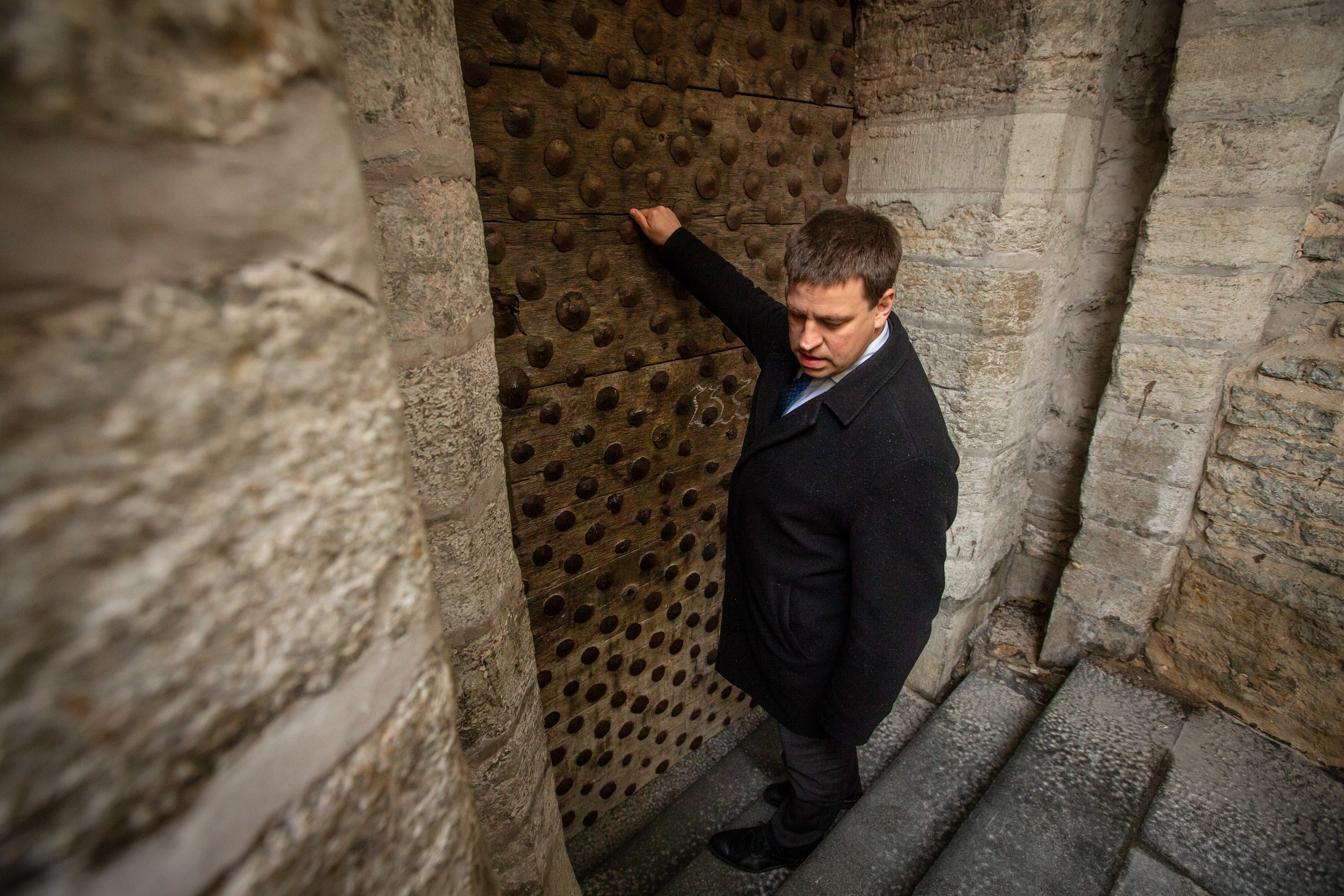 Jüri Ratas koputamas Lühikeses jalas linnaväravale